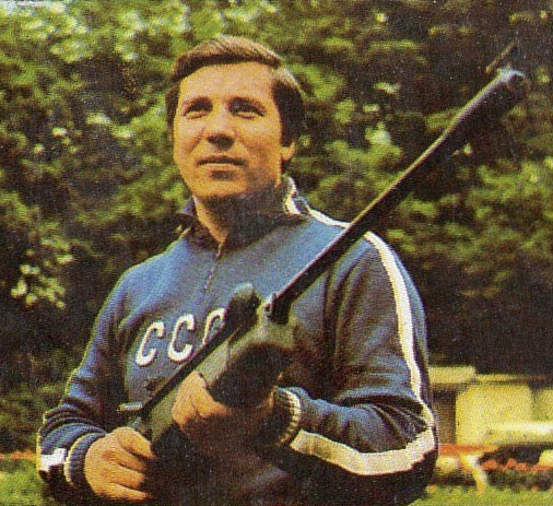 MUNCHEN/MONACO '72-PANINI-Figurina n.173- PARKHIMOVIC - URSS -TIRO-Rec